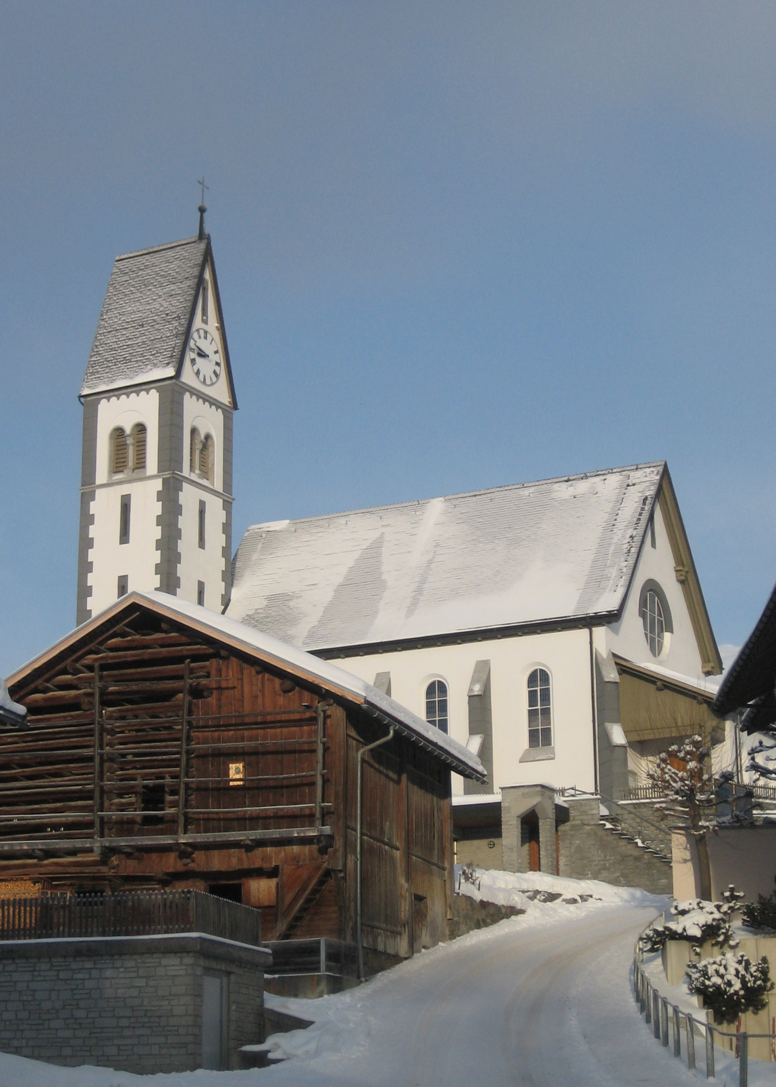 Herz-Jesu Kirche in Falera